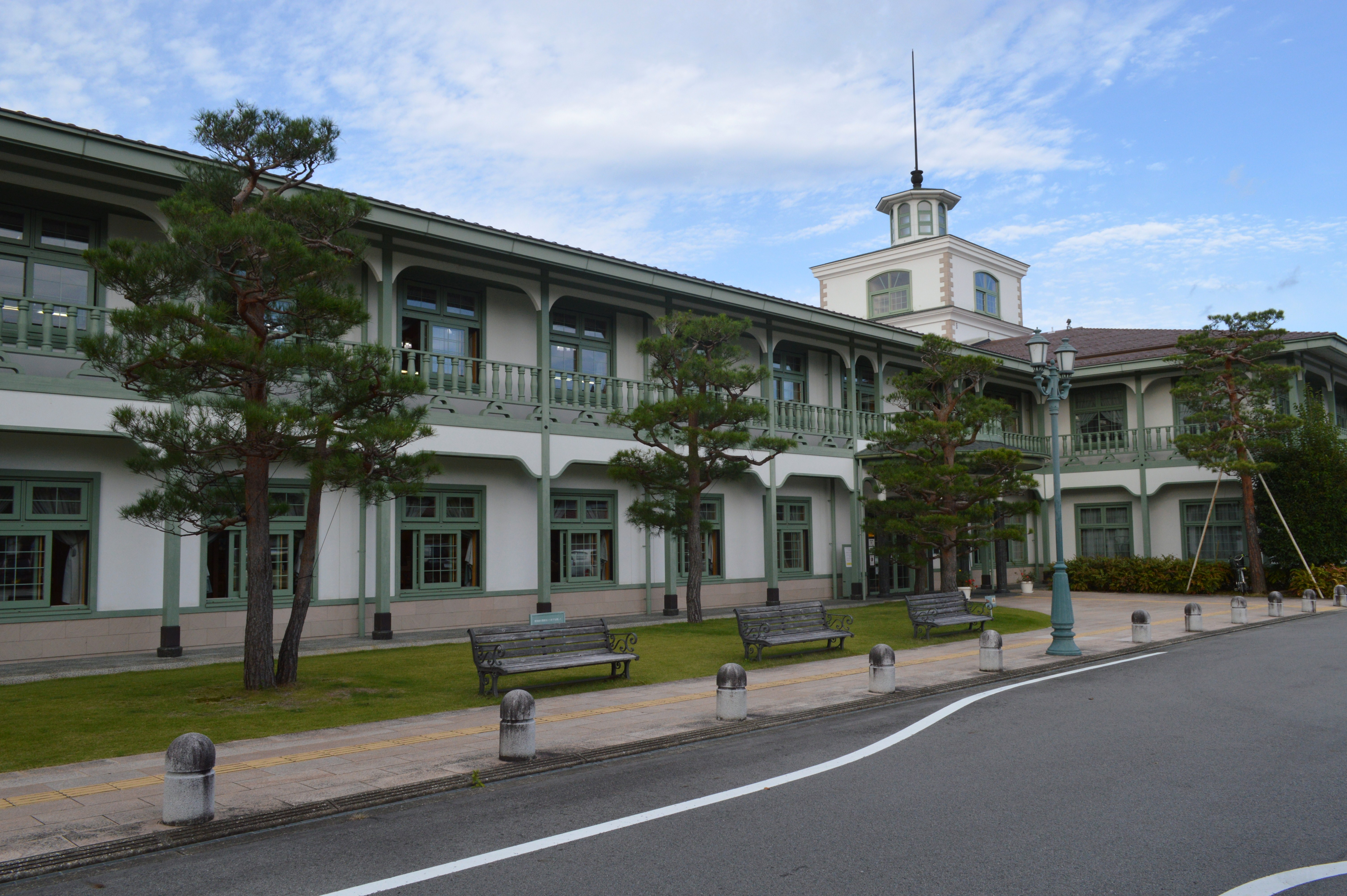 岐阜県の高山市図書館「煥章館」。